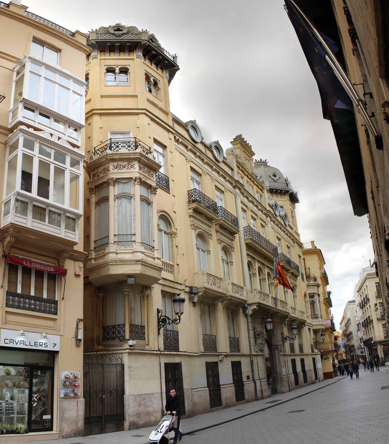 Palacio de Fuentehermosa de Joaquín María Arnau Miramón en Valencia